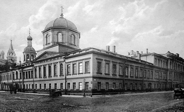 Здание Первой Санкт-Петербургской классической гимназии с церковью во имя Преображения Господня. Фотография из фонда музея 321-ой школы Санкт-Петербурга.